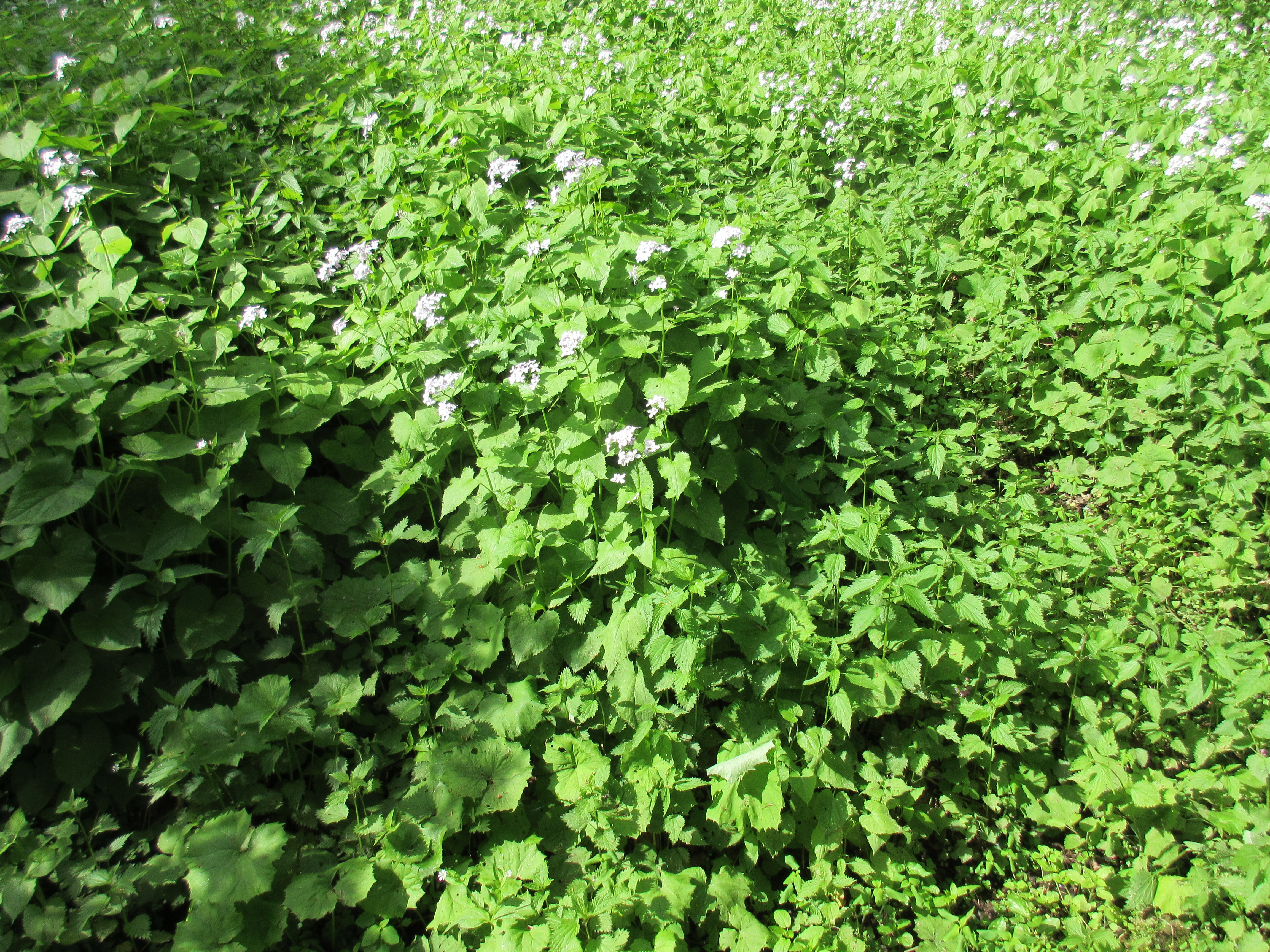 Ukázka ploch porostlých měsíčnicí